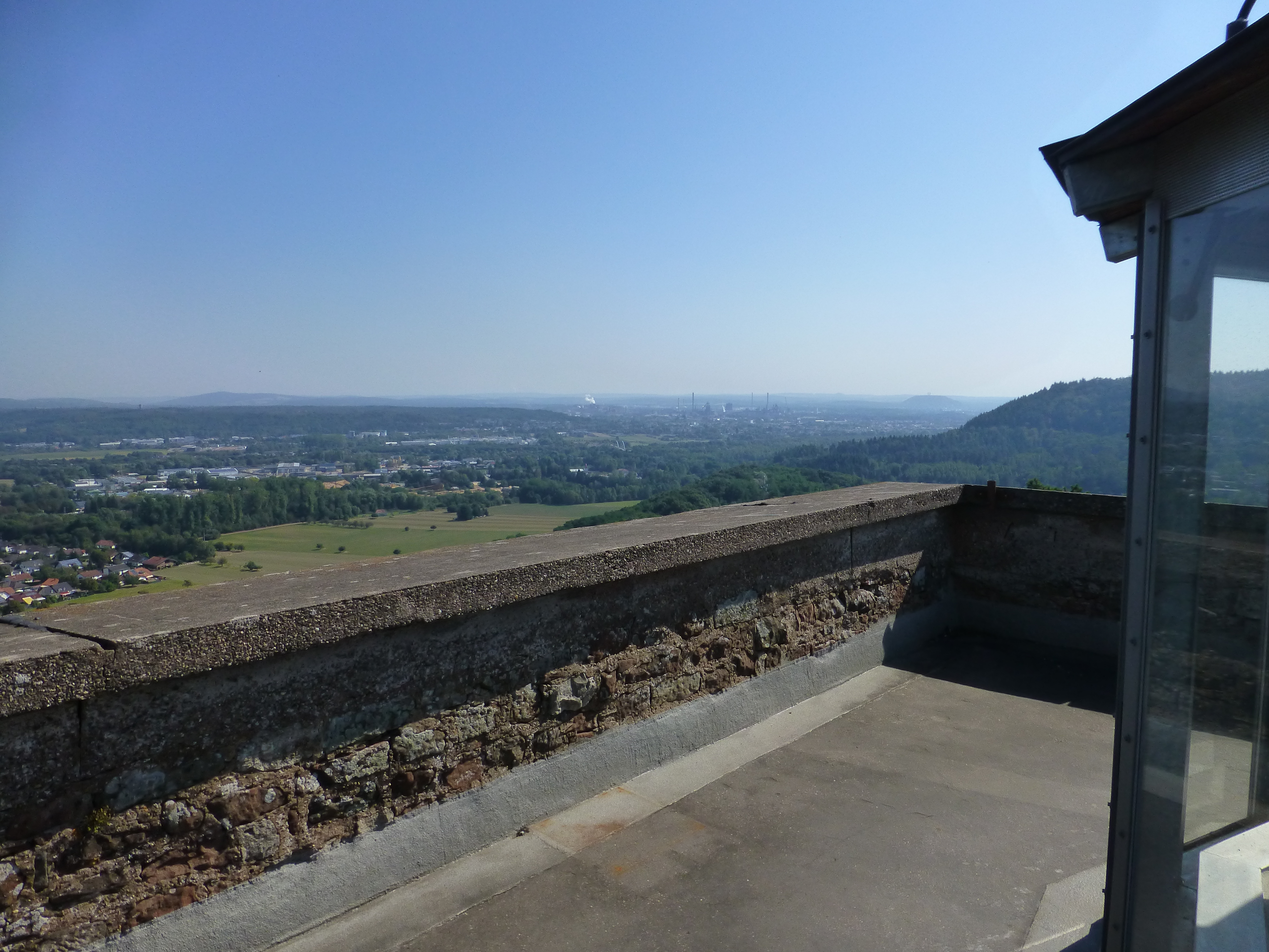 Burgturm Siersburg; Blick von der Plattform ins Saartal nach Dillingen; im Hintergrund ganz links der Litermont, weiter rechts der Hoxberg und rechts hinter Dillingen die Halde Ensdorf